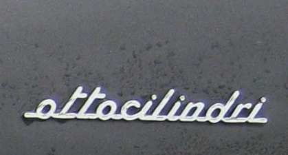 Typenschild Maserati Quattroporte IV ottocilindri